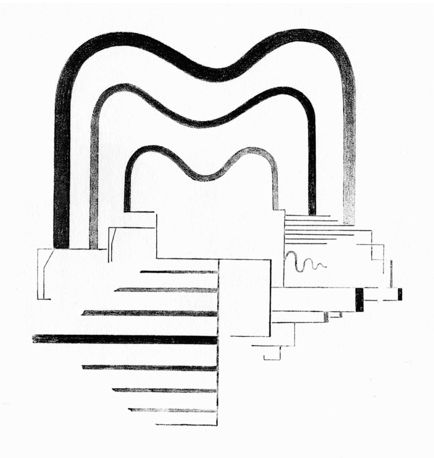 Viking Eggeling. Partie des Horizontal-Vertikalorchesters. c 1921. From De Stijl, vol. 4, nr. 7 (July 1921): facing p. 112.